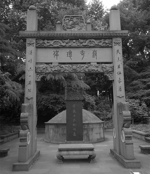 吴语: 杭州西湖旁边个武松墓